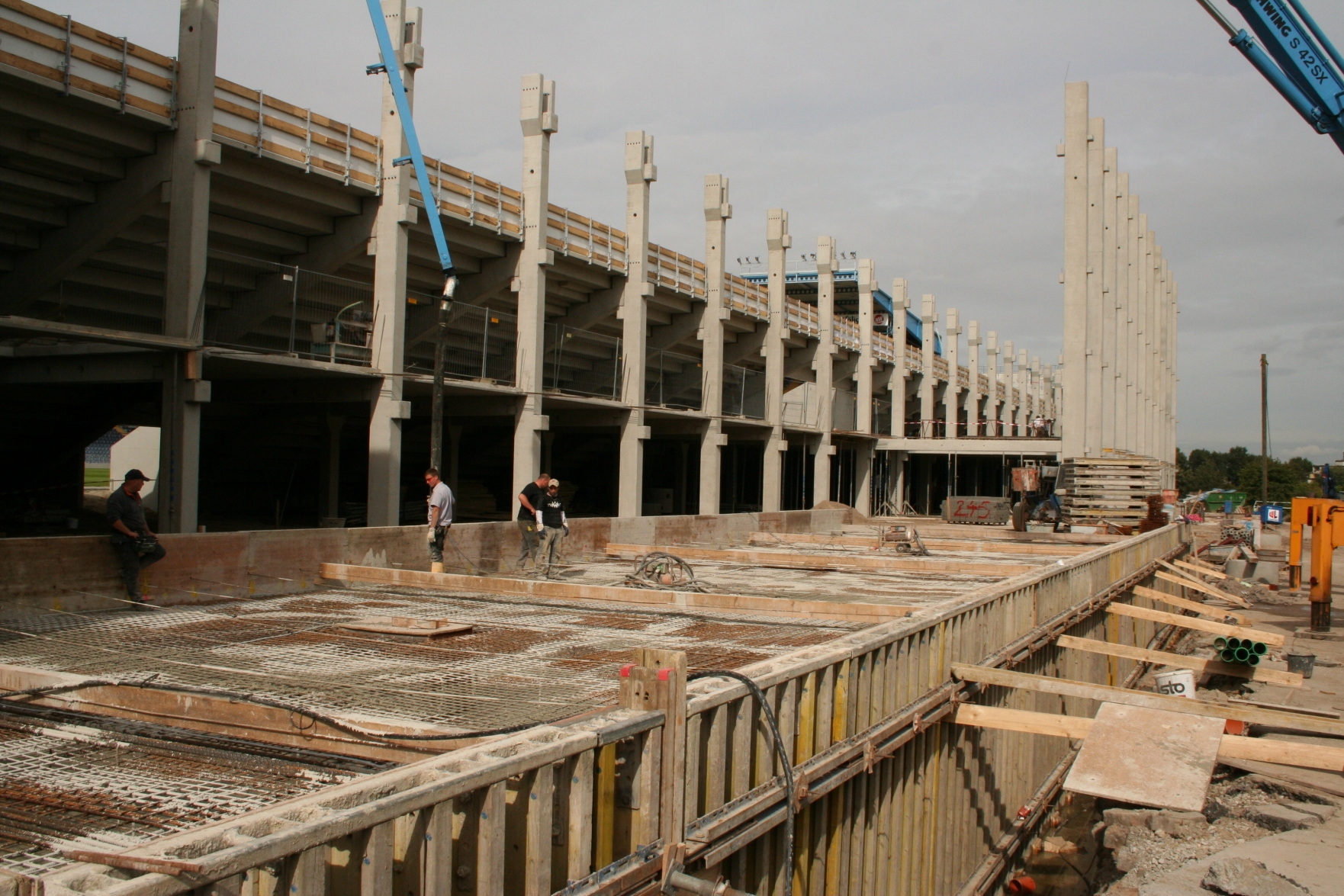 Baustelle der Osttribüne auf der Bielefelder Alm am 21.09.2007